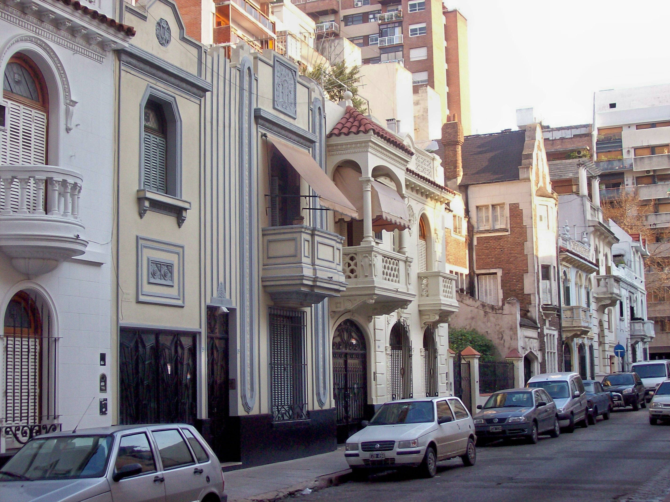 Calle Gorostiaga al 2400 (entre calle Zapata y Av. Cabildo), en el barrio de Colegiales, Buenos Aires, Argentina. Foto tomada desde la vereda Norte a la Sur